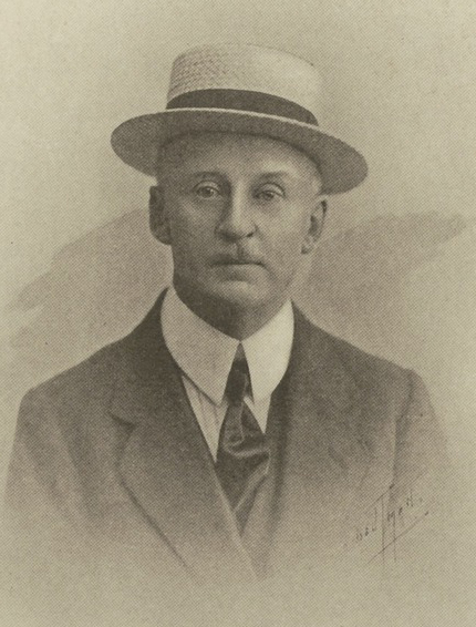 W.J.H. Mulier, erevoorzitter en voormalig voetballer van H.F.C. en tevens voormalig speler van het Nederlands voetbalelftal.